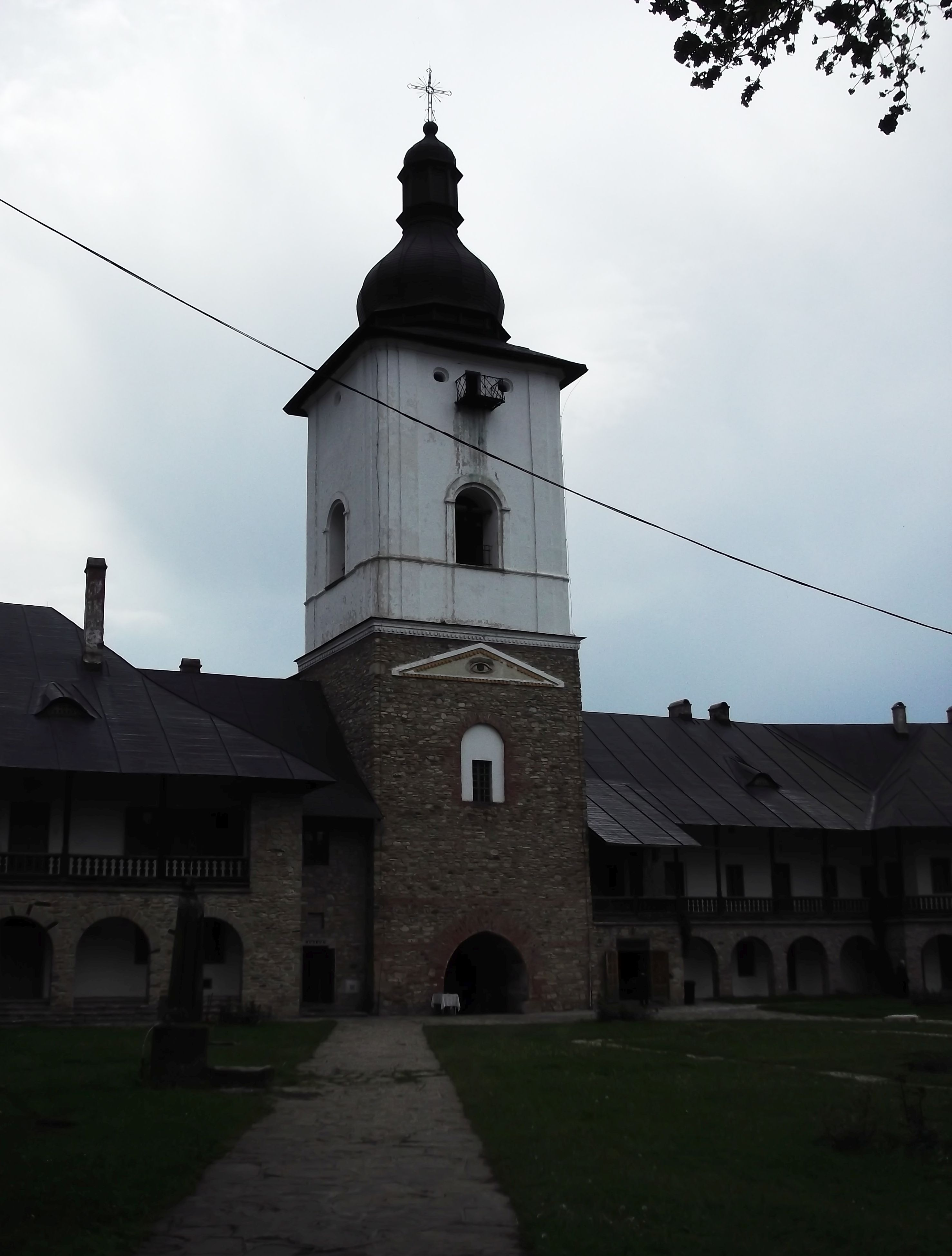 Turn clopotniță de poartă cu paraclisul „Buna Vestire” (V) 04